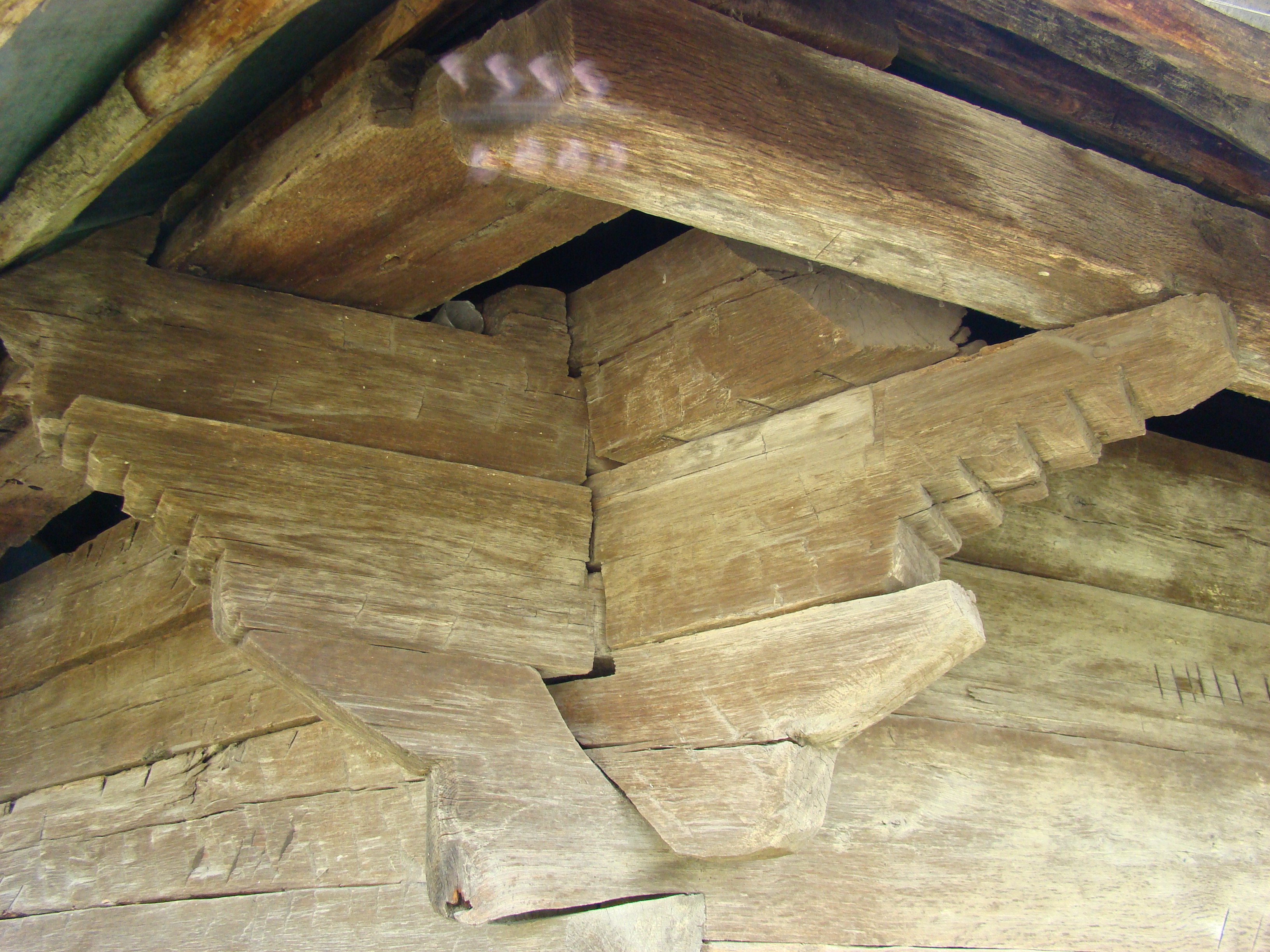 Biserica de lemn „Sf.Voievozi”, sat Pârâu Viu, cătun Glăveni, județul Gorj